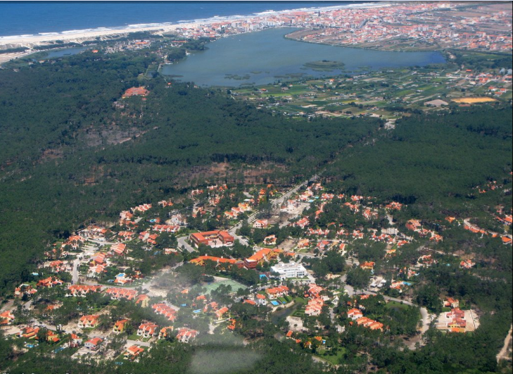 Vista Aérea do Aldeamento Mira Villas